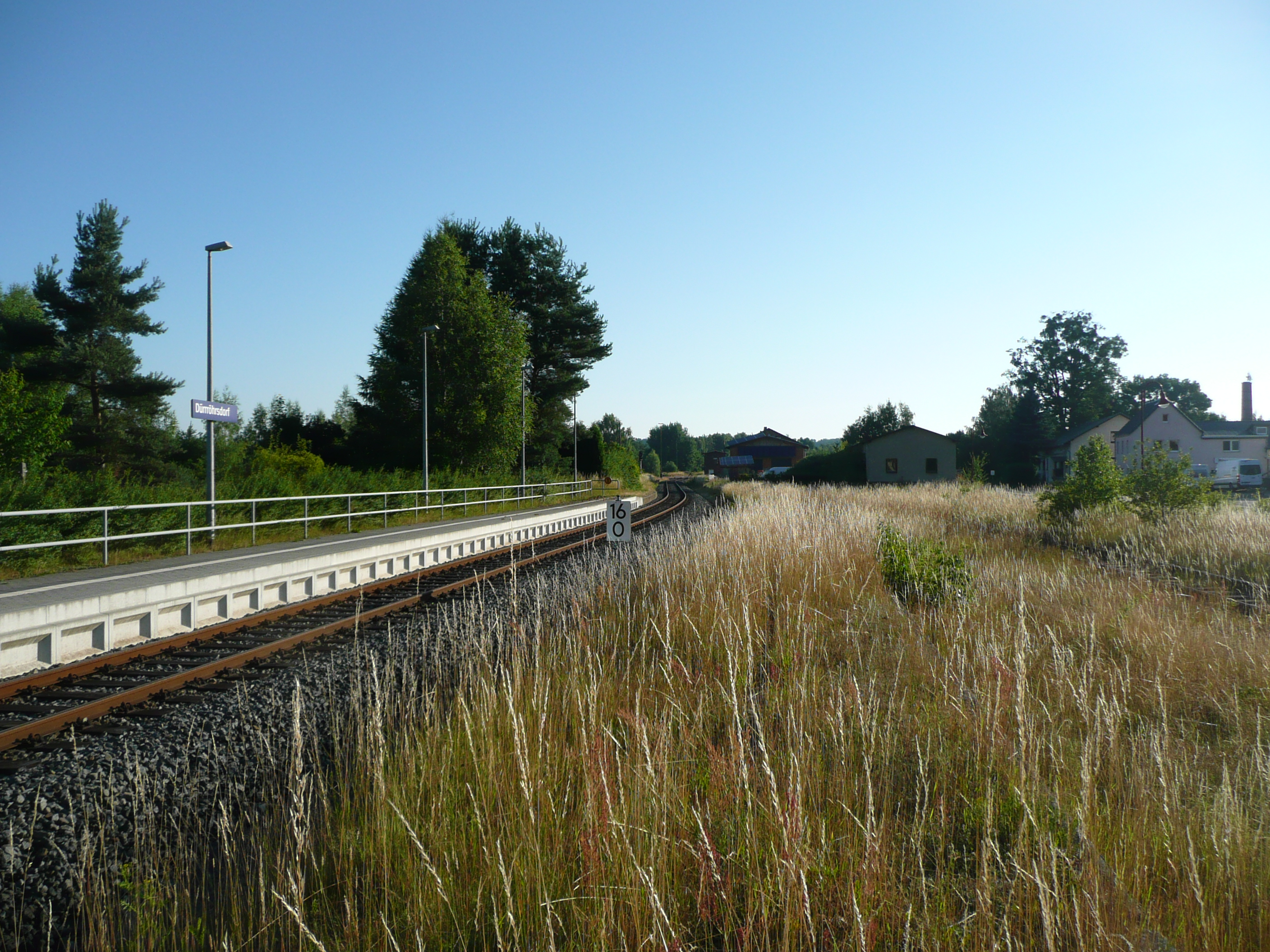 Bahnhof Dürrröhrsdorf Ostseite Richtung Stolpen